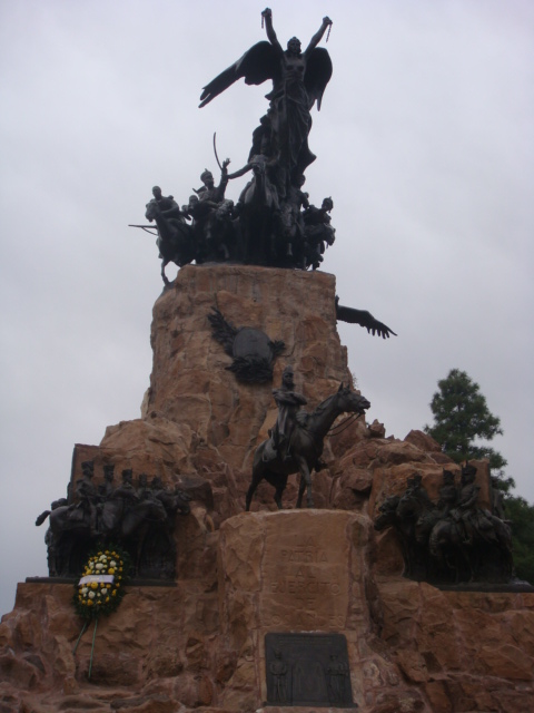 Monumento a San Martin, Cerro Gloria